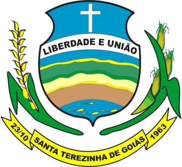 brasão 2